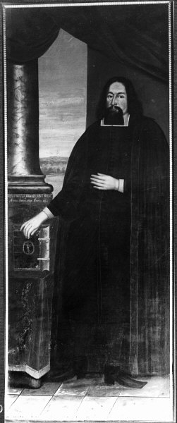 Porträtt av prosten Fredrik Bagge, utförd år 1695. Kategori: (09) PorträttPorträtt av prosten Fredrik Bagge, utförd år 1695.